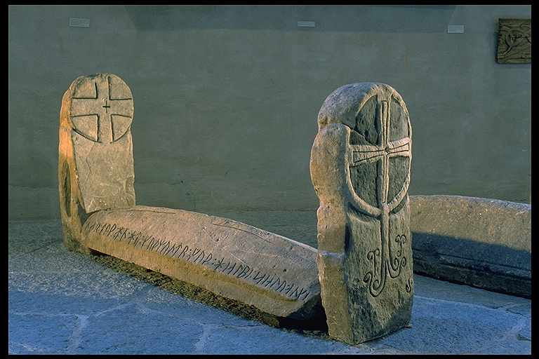 Gravkista, Sm83, med sidogavlar med runor, från Vrigstads kyrka, nu i SHM. Inskriften lyder: Fader och moder .. Sonens död. Han hette Gudmund. Gud hjälpe hans själ. Motiv: Vrigstads kyrka Nyckelord: Runor Kategori: (09) Gravar Gravkista, Sm83, med sidogavlar med runor, från Vrigstads kyrka, nu i SHM. Inskriften lyder: Fader och moder .. Sonens död. Han hette Gudmund. Gud hjälpe hans själ.